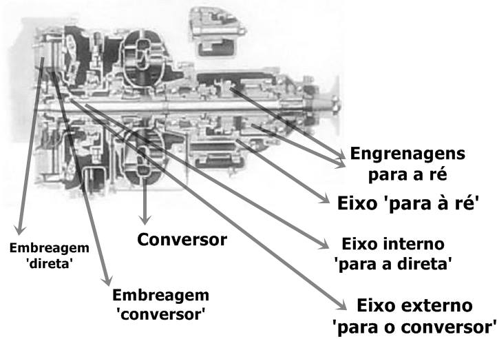 Foto de um desenho feito por mim de um corte de uma caixa Leyland Lysholm Smith